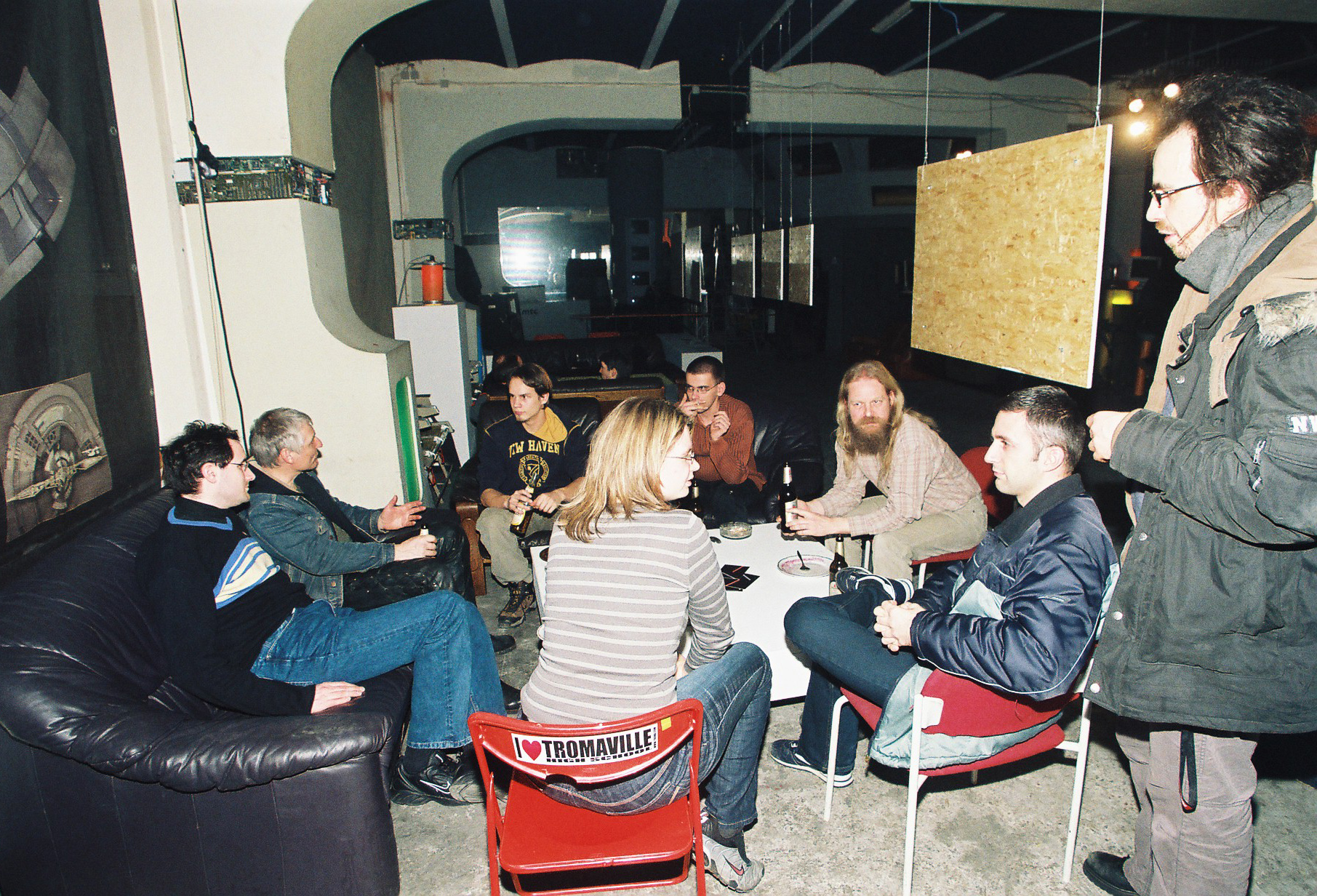 spectáculo en la c-base